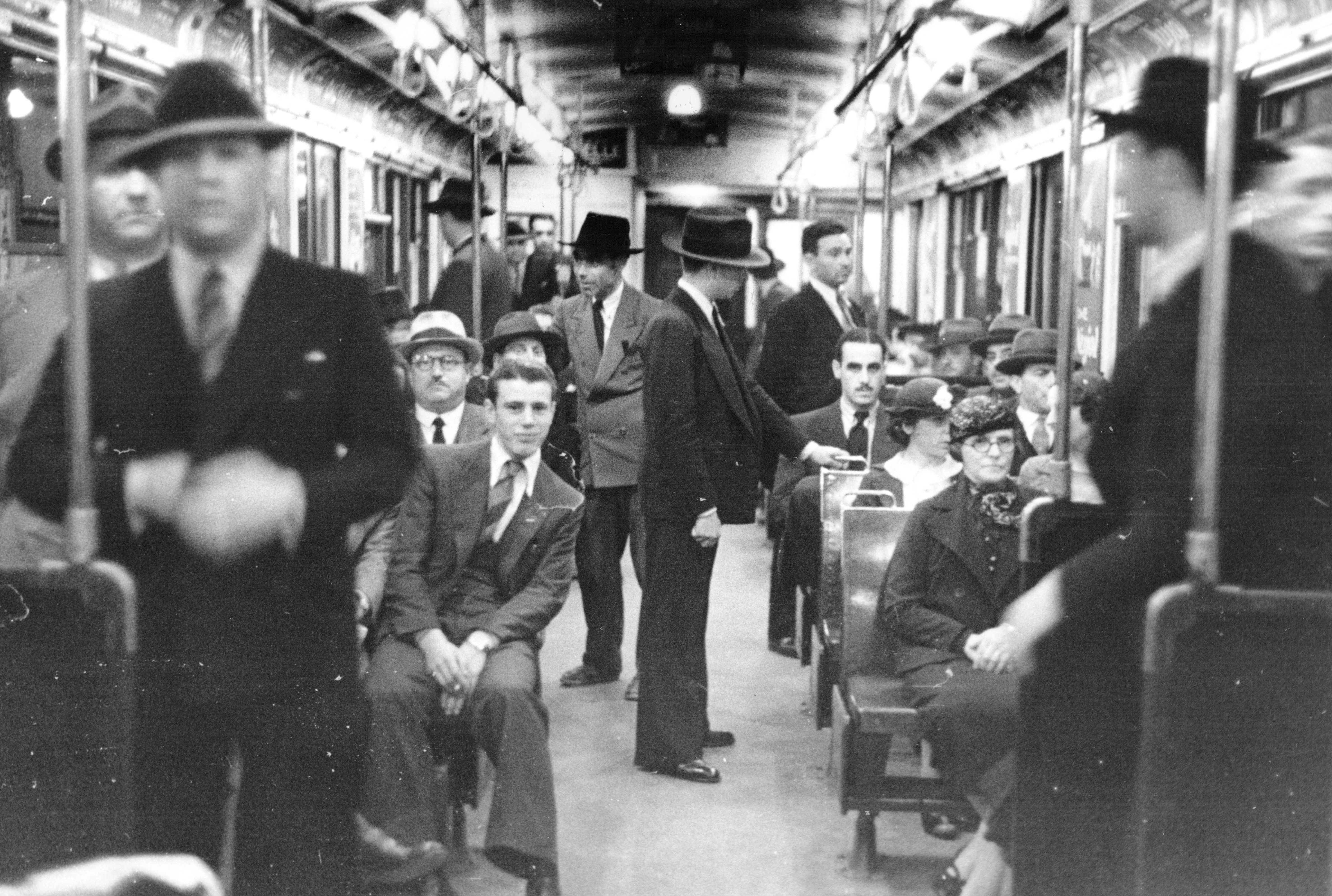 Interior de un coche Metropolitan Cammell de la línea B de la red de subterráneos de la Ciudad de Buenos Aires, entonces Subterráneo Lacroze.